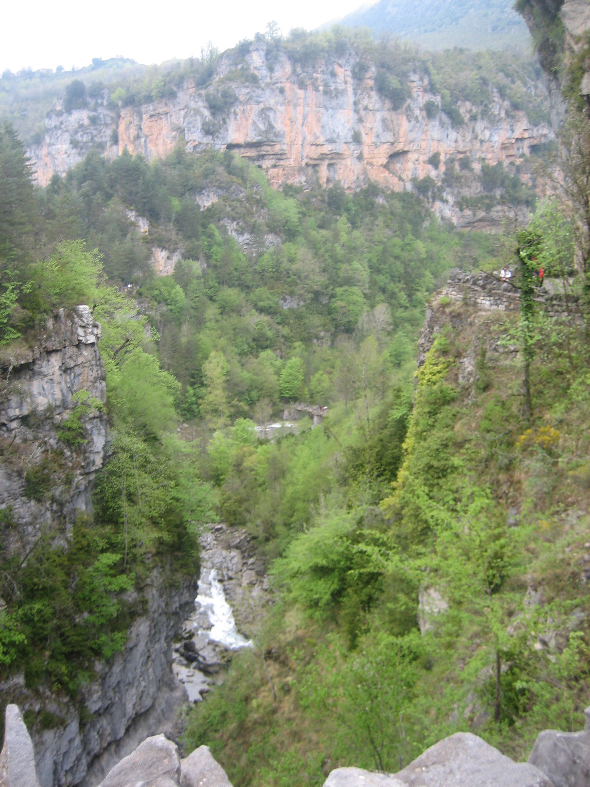 Cañón del Añisclo This is a photography of a Site of Community Importance in Spain with the ID: ES0000016. Natura2000 entry, EEA entry